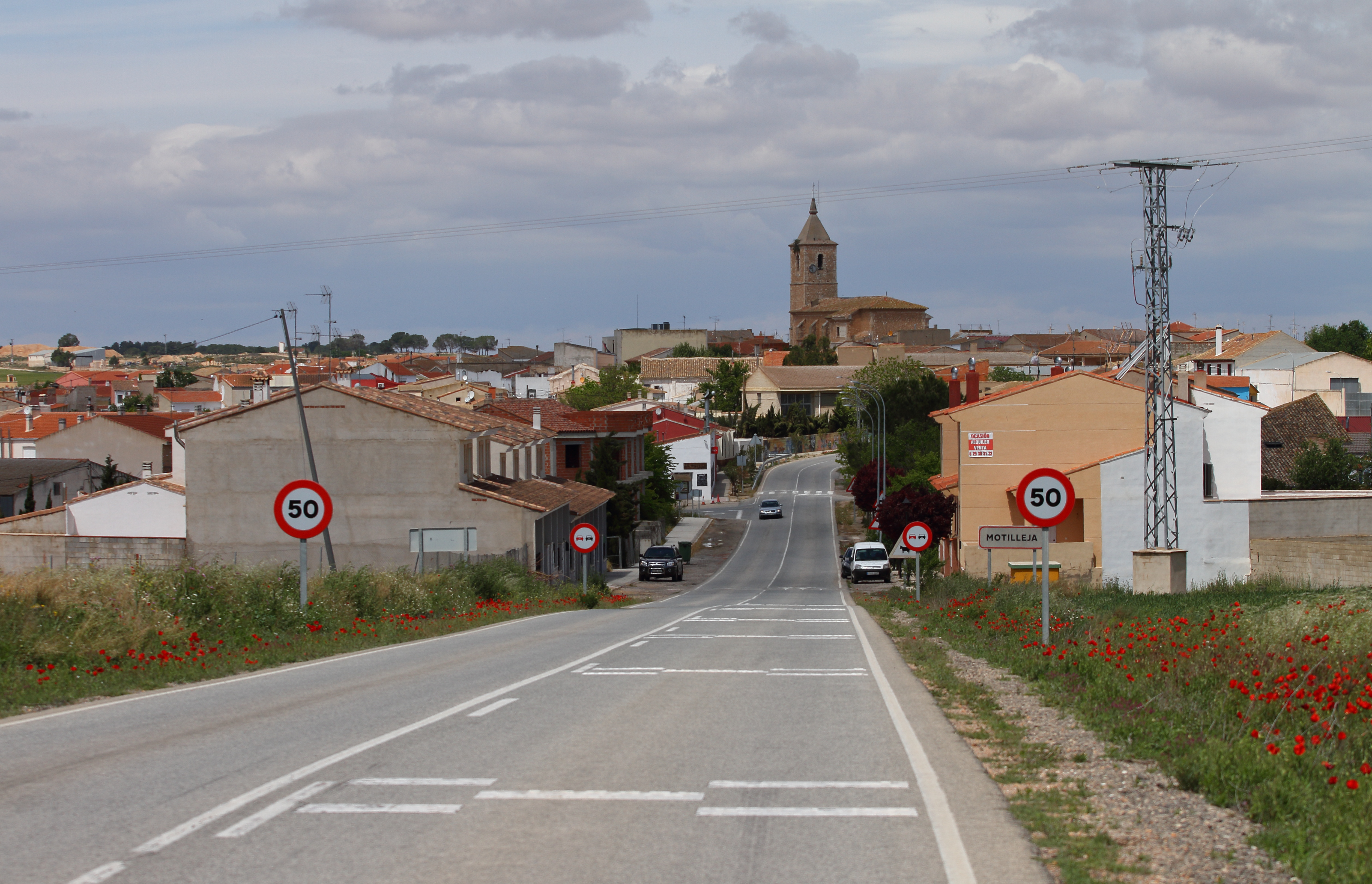 Motilleja, desde CM-3222, 01